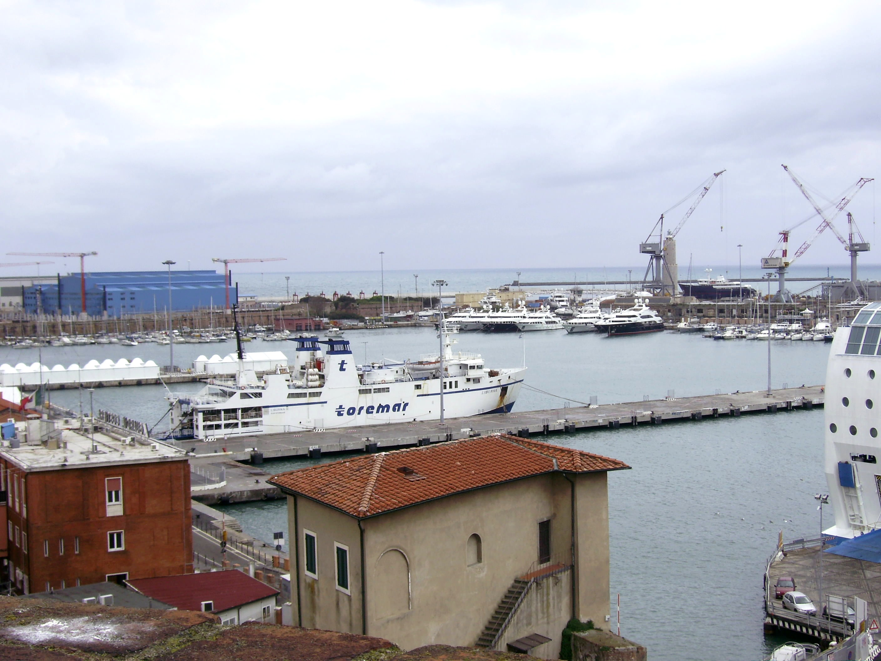 Traghetto della Toremar ormeggiato nel porto di Livorno Shipname: Liburna IMO Number: 8706727 MMSI Number: 247044300 Callsign: IWUH Length: 71 m Beam: 14 m